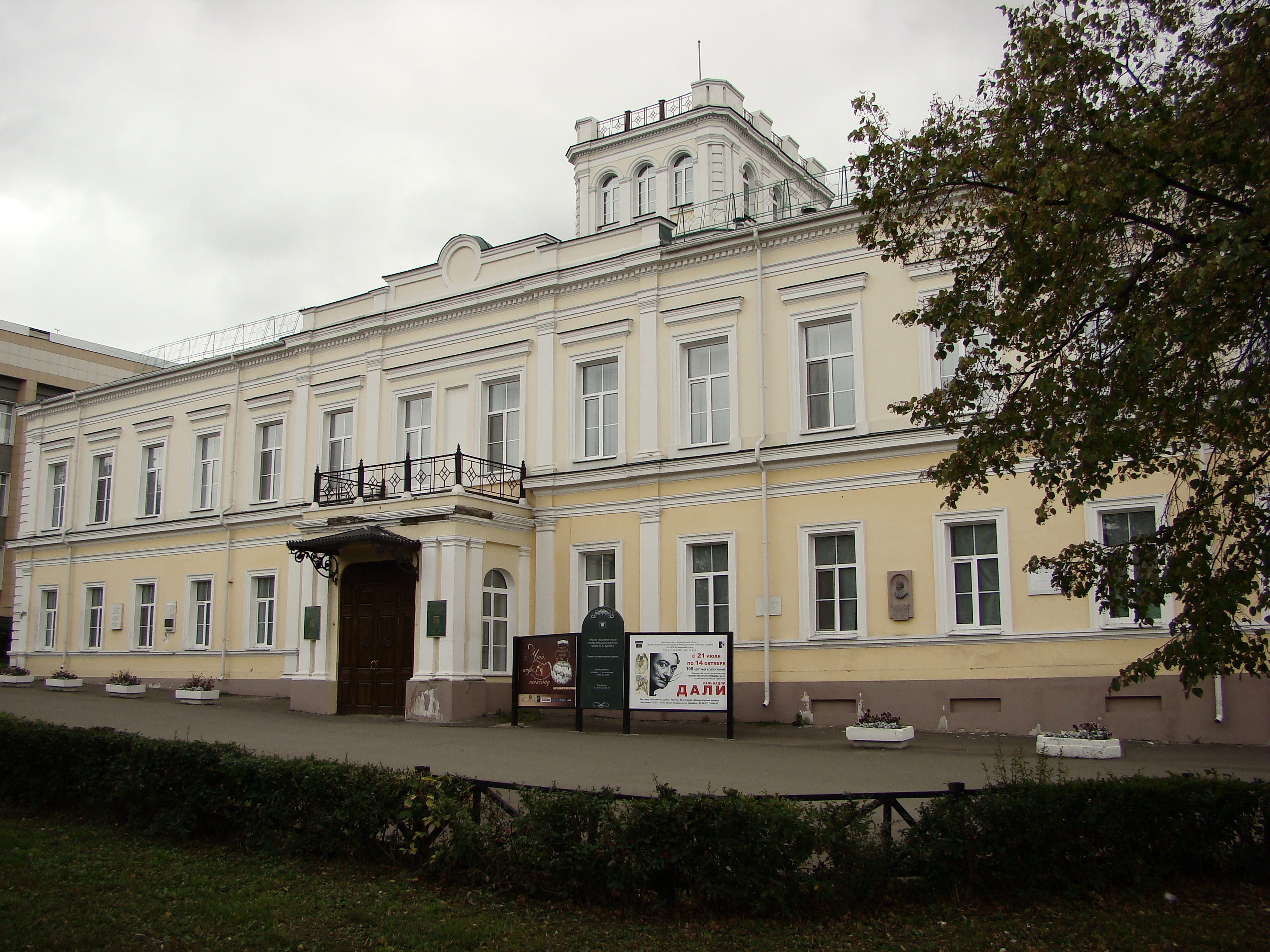 С 1862-го по 1882 г. резиденция генерал-губернаторов Западной Сибири, с 1882-го по 1917 г. - генерал-губернаторов Степного генерал-губернаторства, современность - городской краеведческий музей